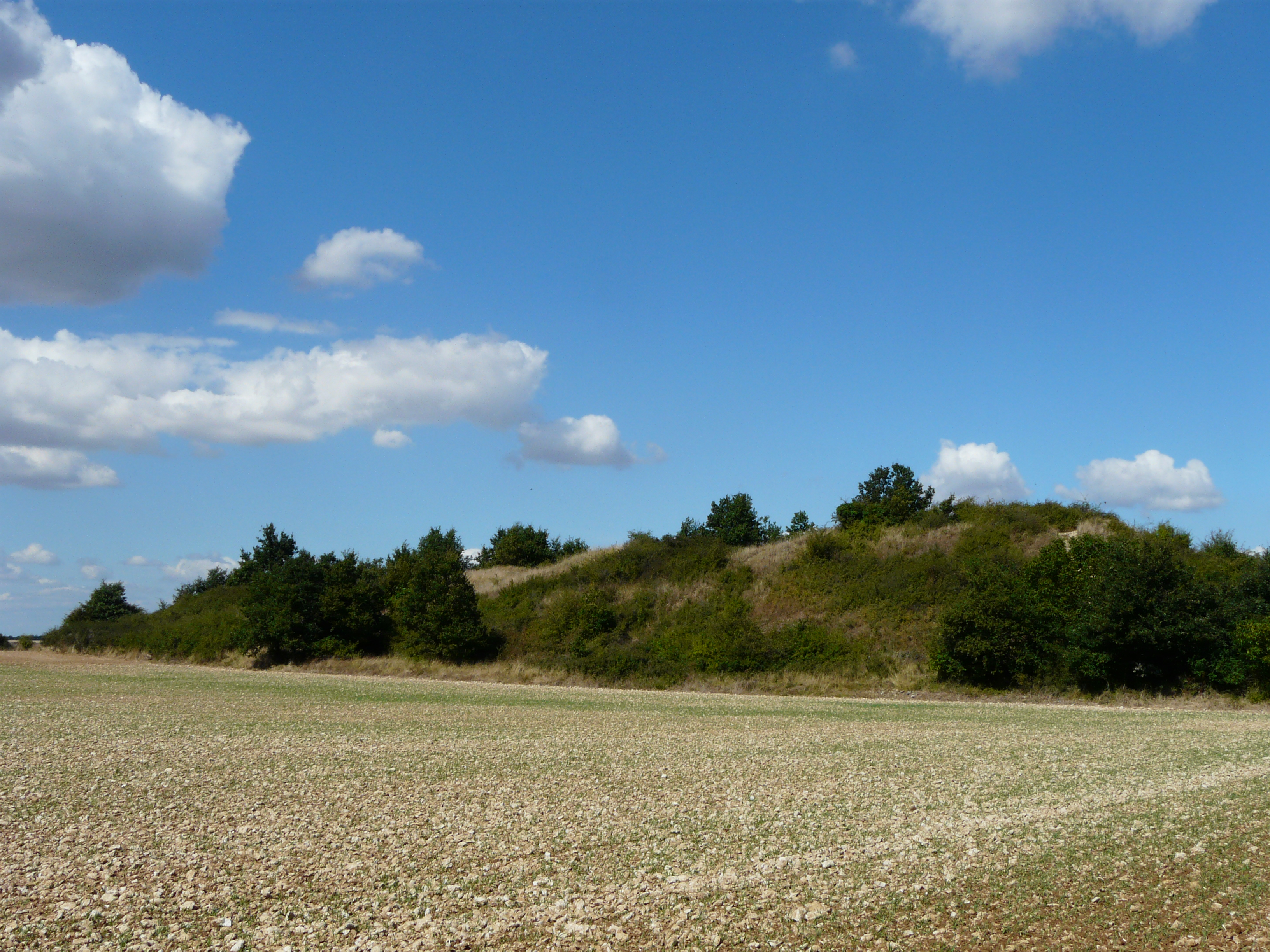 Le tumulus de la Motte de Puytaillé, Assais-les-Jumeaux, Deux-Sèvres, France.